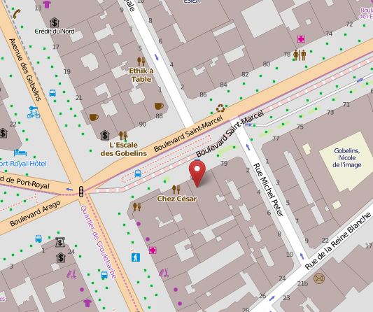 Emplacement de l'ancienne collégiale Saint-Marcel - Paris V et Paris XIII